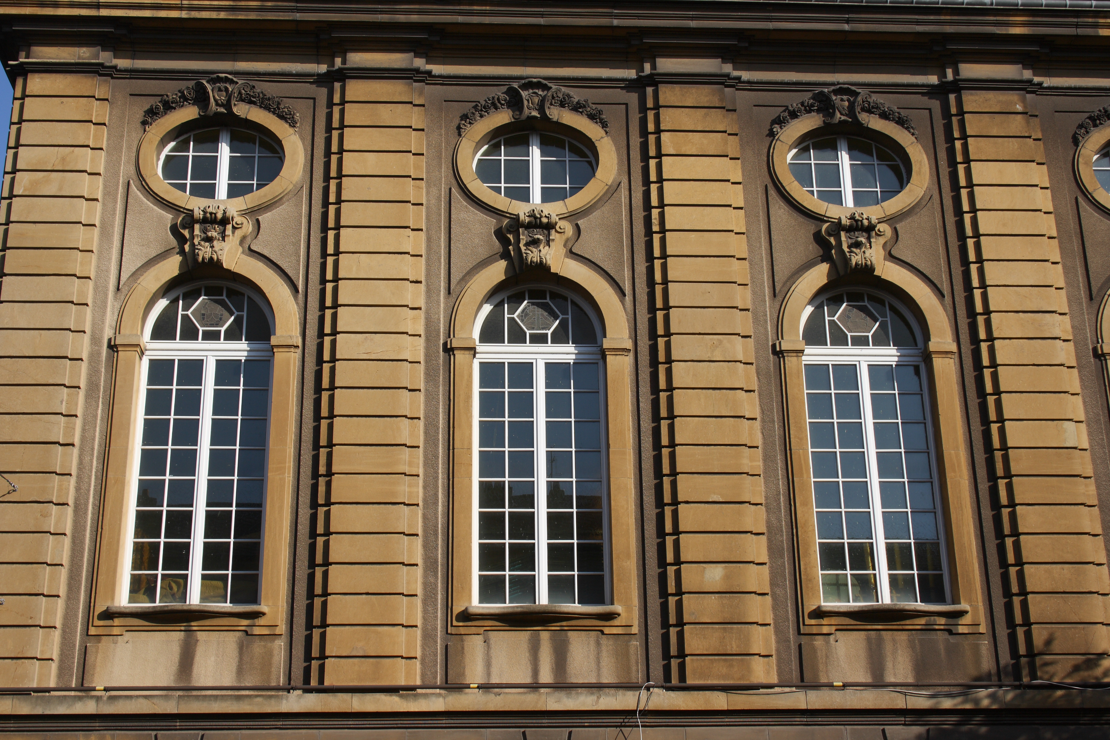 Lycee et College Charlemagne in Thionville (siehe [1])